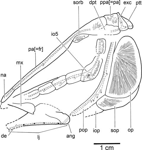 Uarbryichthys latus, Late Jurassic, Talbragar, New South Wales, Australia (slighly modified from Bartram 1977a; head reversed to the left). Restoration of the head in lateral view. Abbreviations: ang – angular; de – dentary; dpt – dermopterotic; exc – extrascapula; io5 – infraorbital bone 5; iop – interopercle; lj – lower jaw; mx – maxilla; na – nasal bone; op – opercle; pa[= fr] – parietal bone [= frontal bone of traditional terminology]; ppa[= pa] – postparietal bone [= parietal bone of traditional terminology]; mx – maxilla; pmx – premaxilla; pop – preopercle; ptt – posttemporal bone; r.op – right opercle; sop – subopercle; sorb – supraorbital bone.